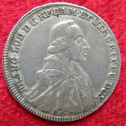 20 Kreuzer 1785, Münzvorderseite mit Portrait des Bamberger und Würzburger Fürstbischofs Franz Ludwig von Erthal (1730-1795)